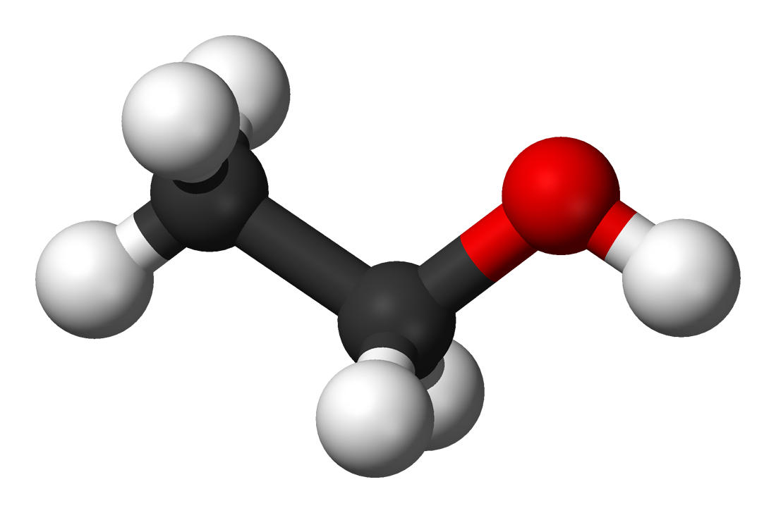 Ethanol molecular model